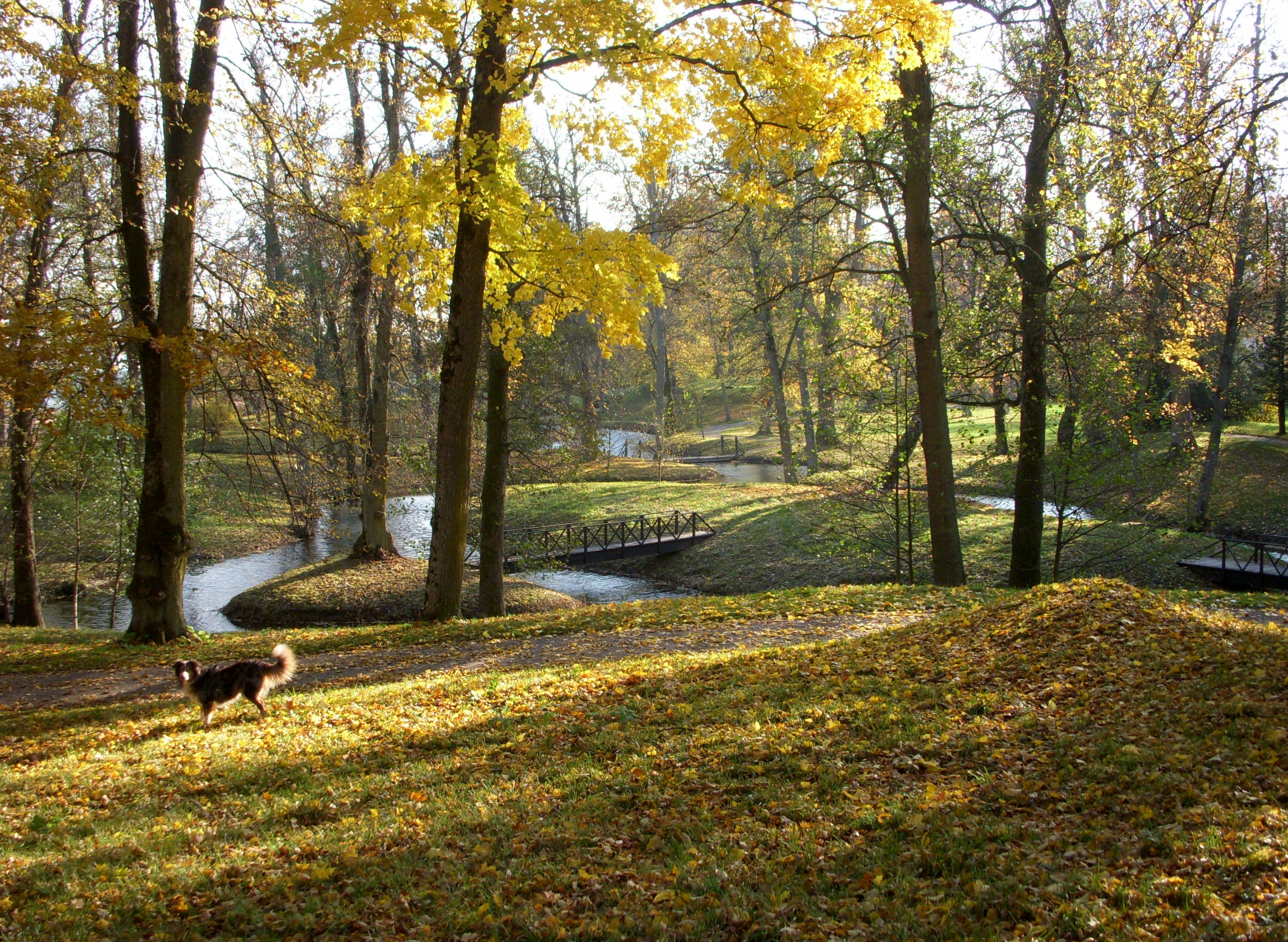 Tullgarns slott, Engelska parken